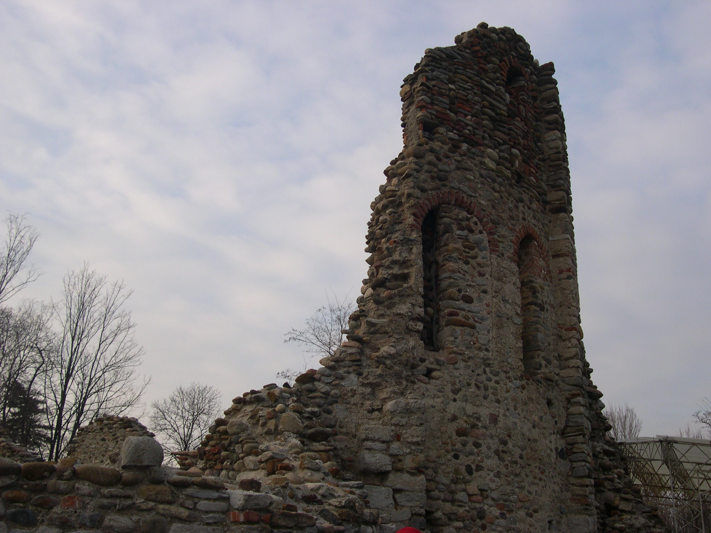 Resti della Chiesa di San Giovanni Evangelista nel Castrum di Castelseprio